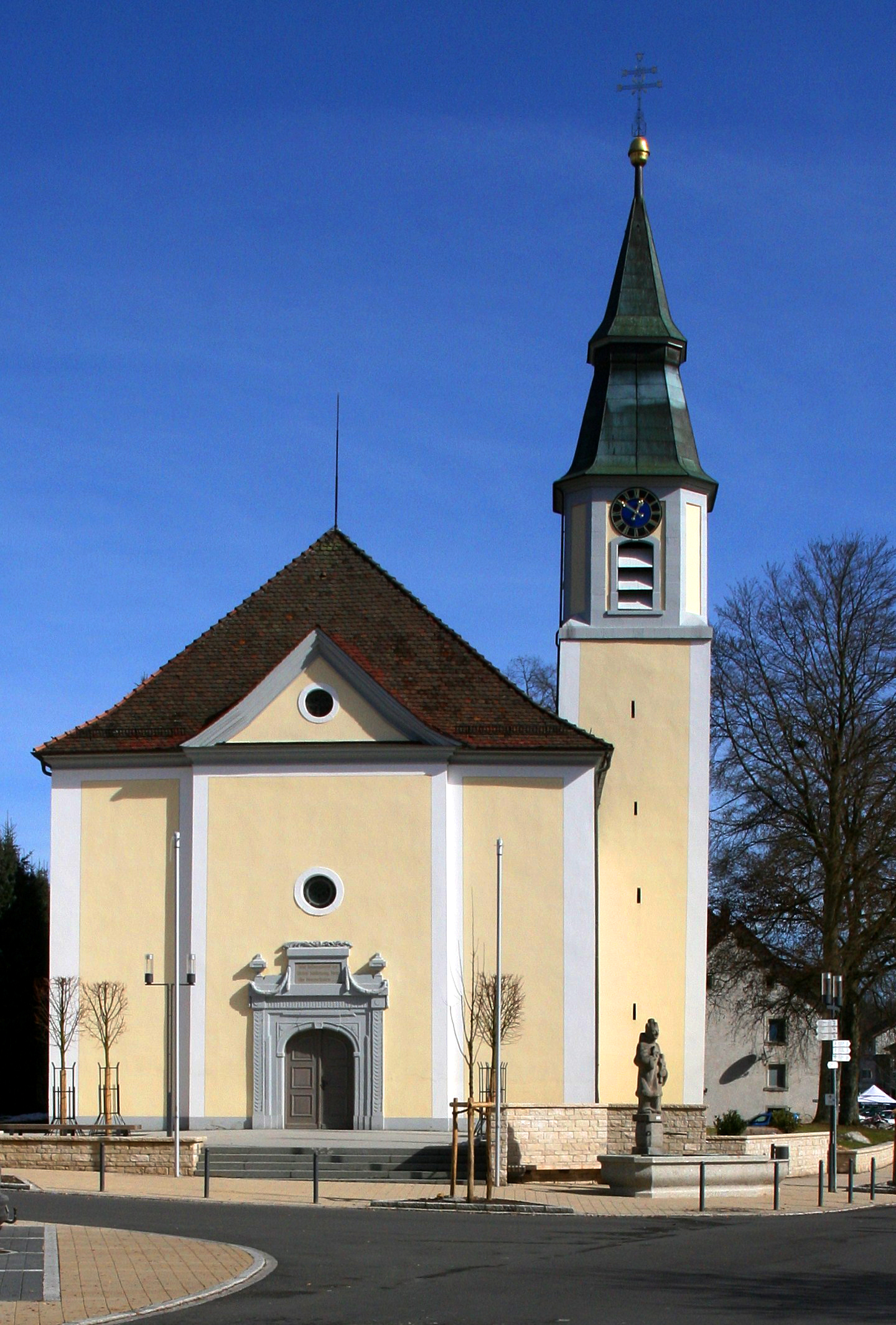 Die katholische Stadtpfarrkirche Heilig-Kreuz in Stühlingen (Landkreis Waldshut, Baden-Württemberg). Die Saalkirche mit seitlichem Turm wurde im frühklassizistischen Stil (Louis XVI-Stil, bzw. Empire-Stil) durch den Hofbaumeister des Fürstentums Fürstenberg Franz Josef Salzmann ausgeführt.